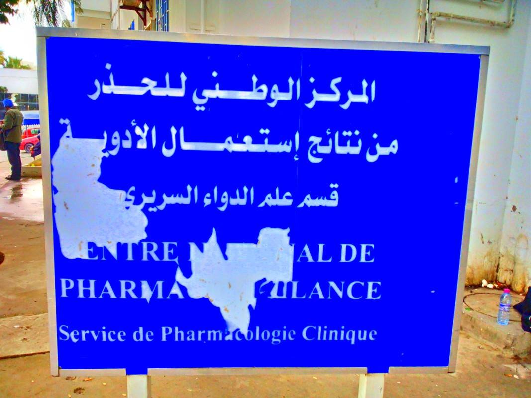 Tunis, Tunisie تونس العاصمة، تونس